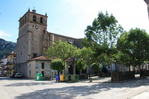 Uharte-Arakilgo herriko plaza. Nafarroa, Euskal Herria.